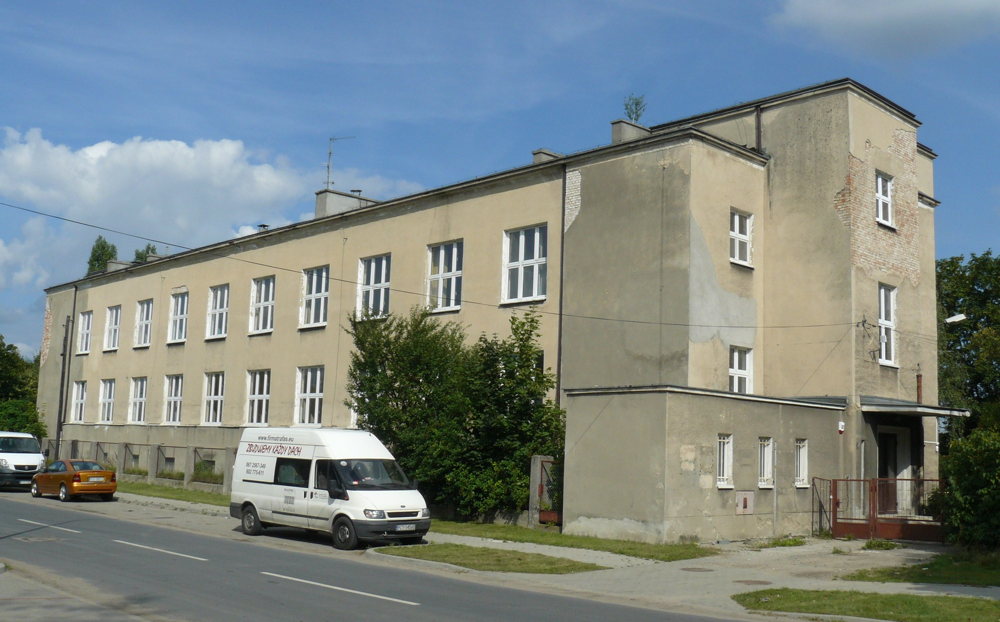 Przytułek dla bezdomnych przy ul. św. Wincentego w Poznaniu. Późniejszy szpital zakaźny.